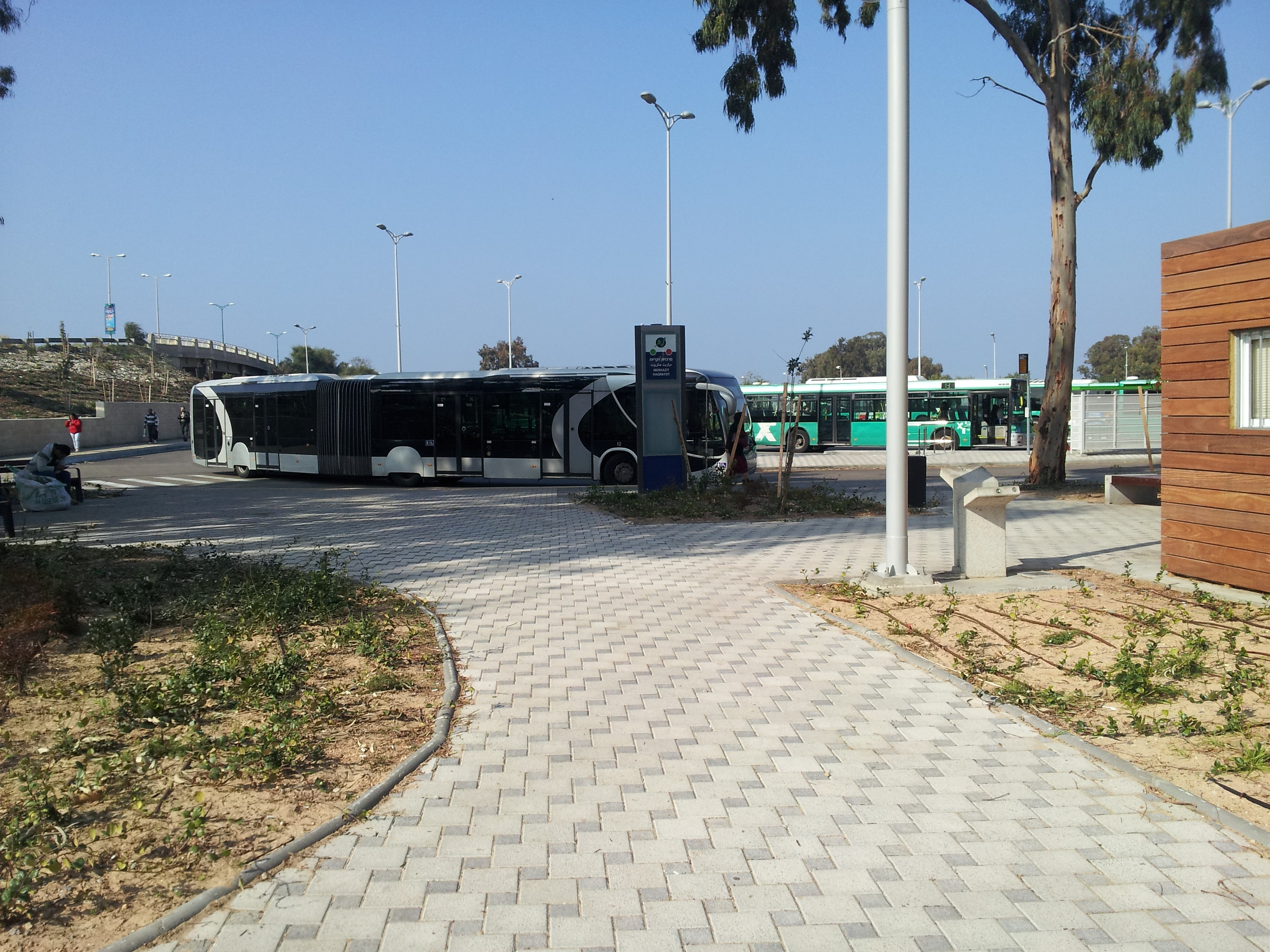 מרכזית הקריות